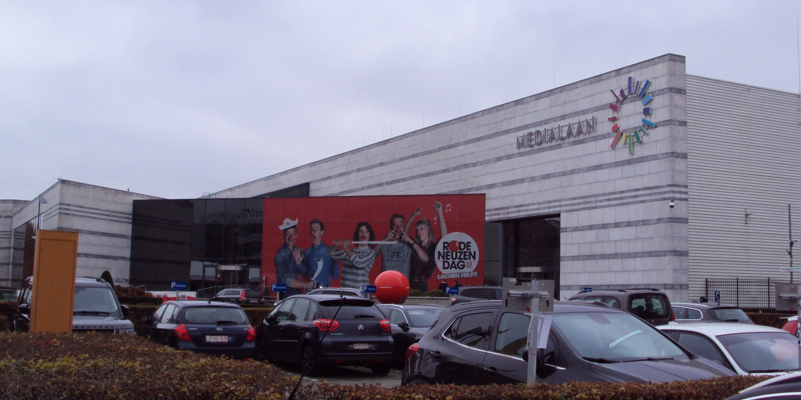 Gebouw van Medialaan in Vilvoorde (België)